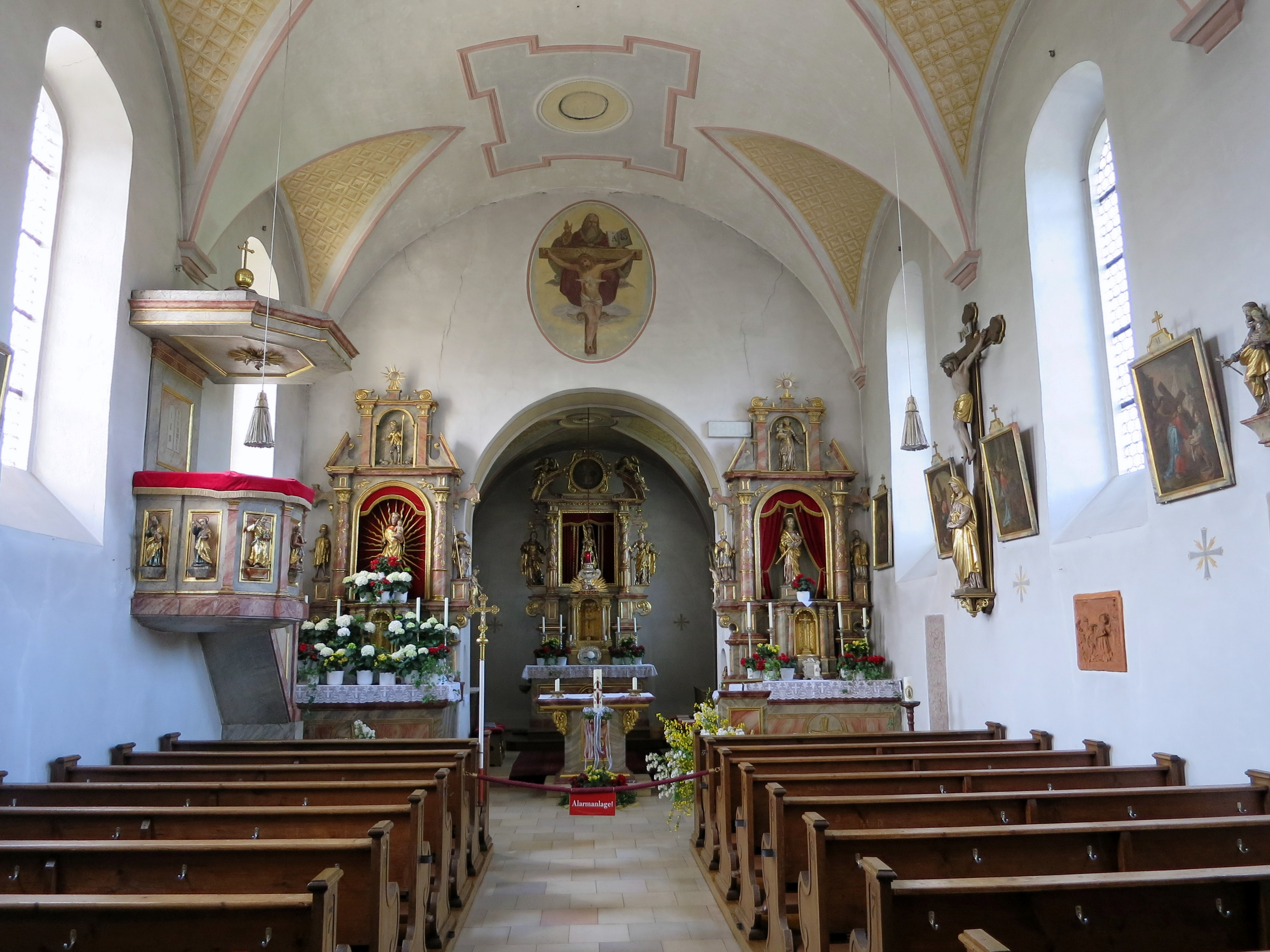 Katholische Pfarrkirche St. Vitus im OT Göbelsbach der Stadt Pfaffenhofen an der Ilm, Landkreis PAF.